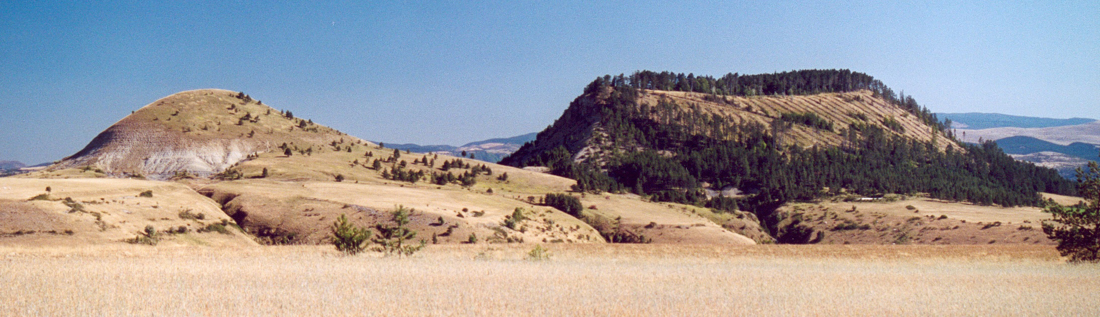 France Lozere Les Bondons Photographie prise par GIRAUD Patrick Août 2005